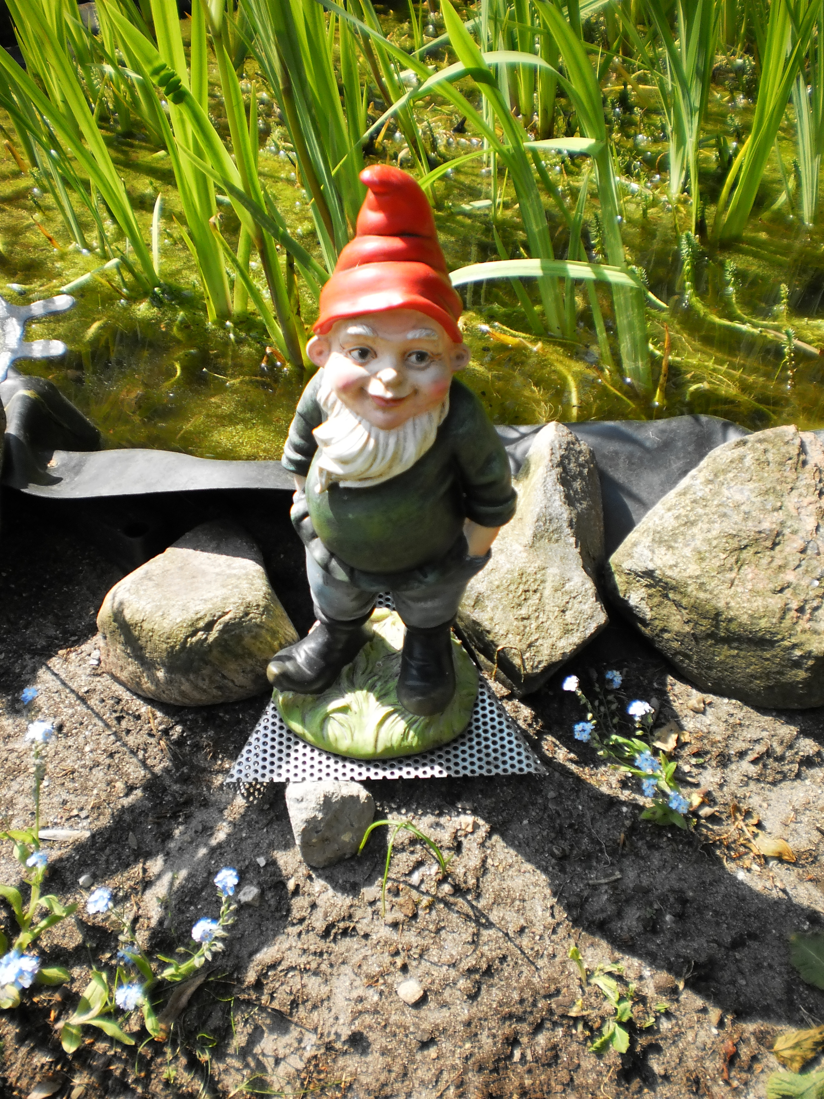 Gartenzwerg als Teichwächter